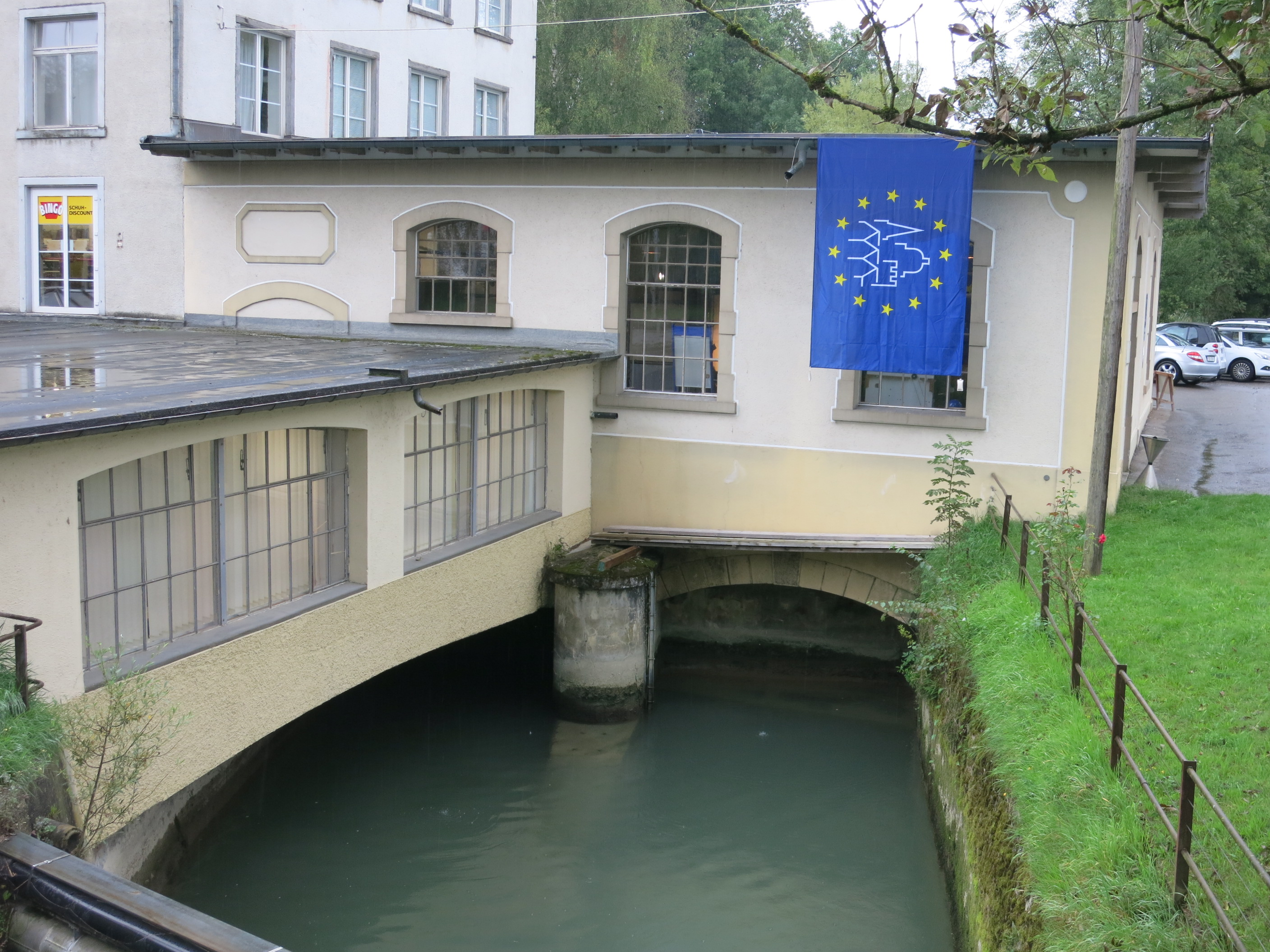 Historisches Kleinkraftwerk Ottenbach ZH, Schweiz